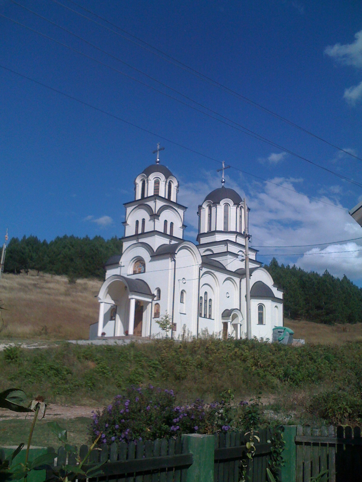 Crkva u Stubici. Autor Vladan Milojevic®